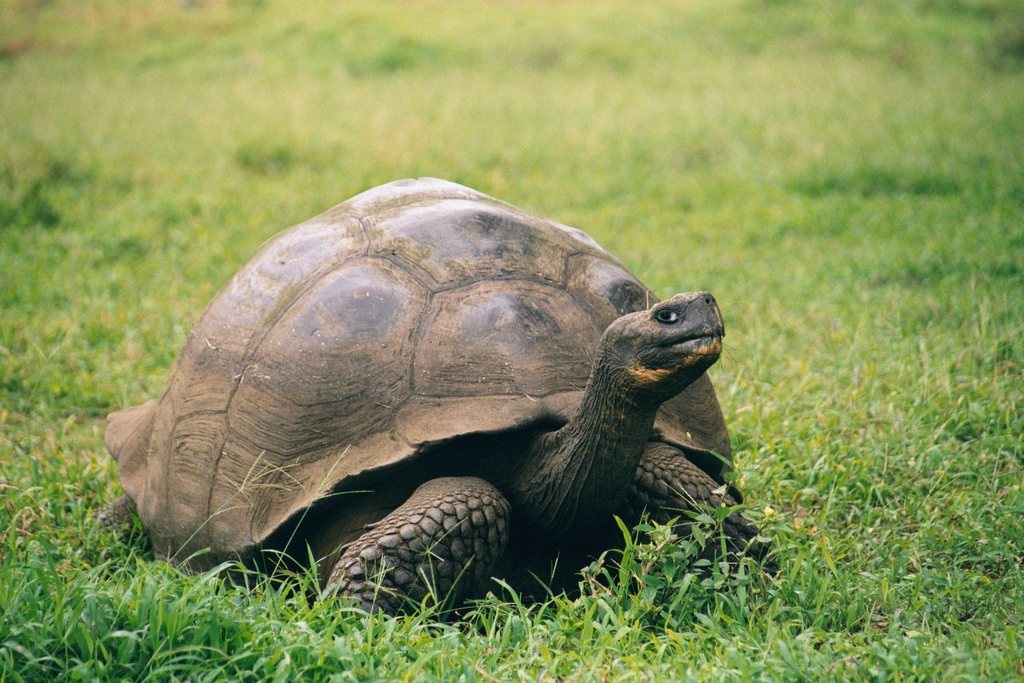 ¨Galapagas Riesenschildkröte Geochelone nigra porteri